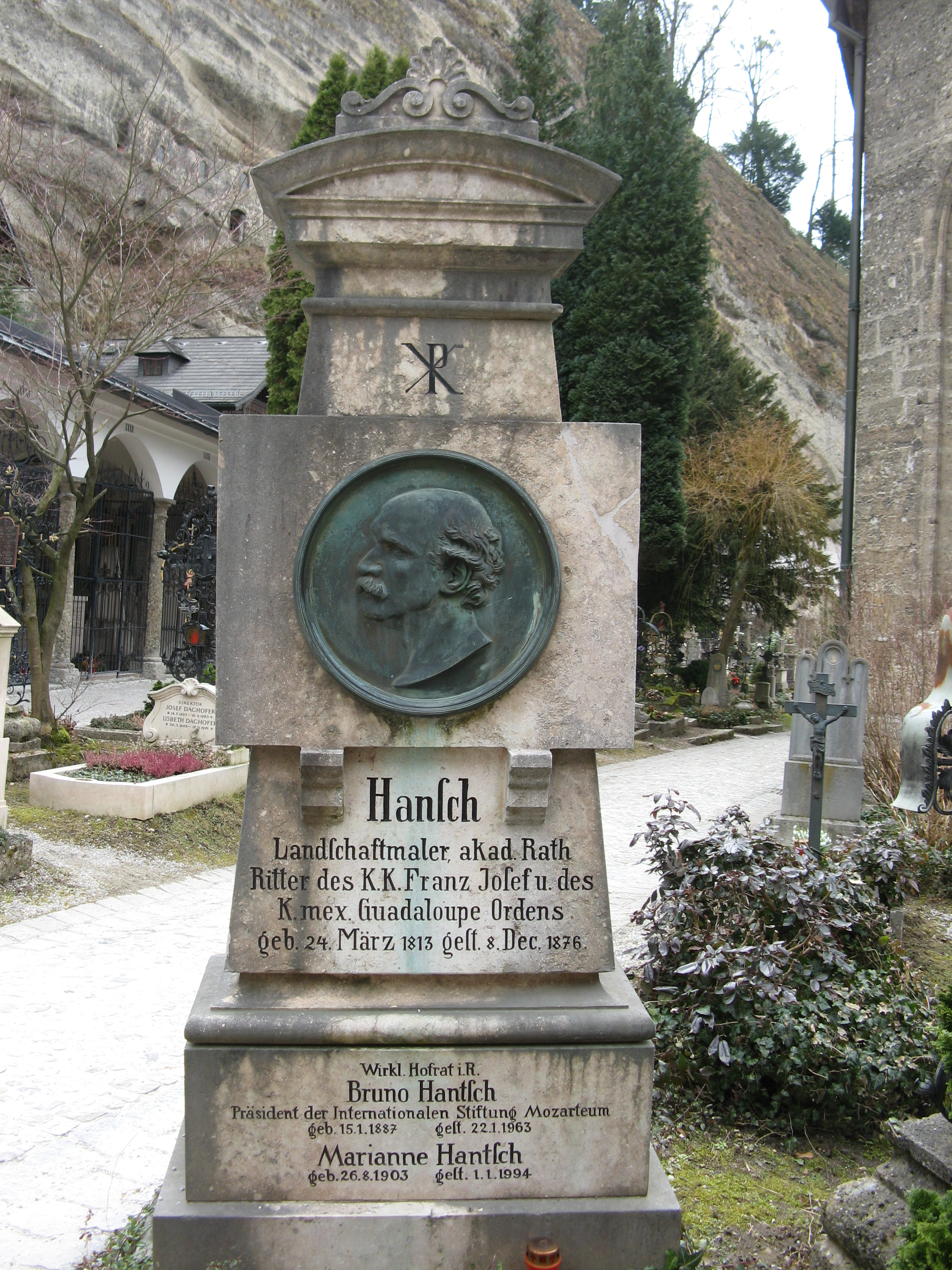 Grab des Malers Anton Hansch auf dem Petersfriedhof, Salzburg